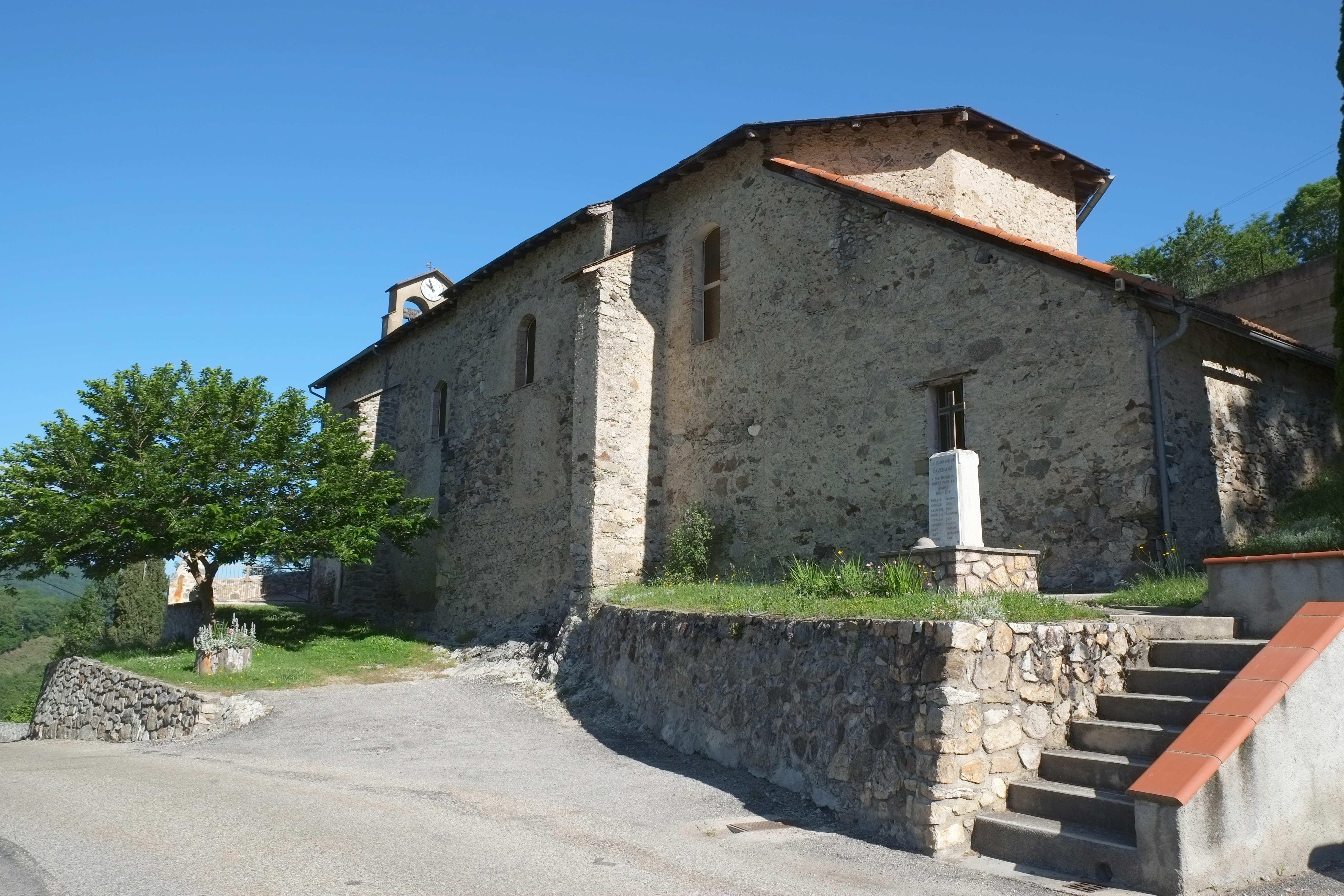 Kirche in Cazenave-Serres-et-Allens im Département Ariège der Region Midi-Pyrénées (Frankreich)